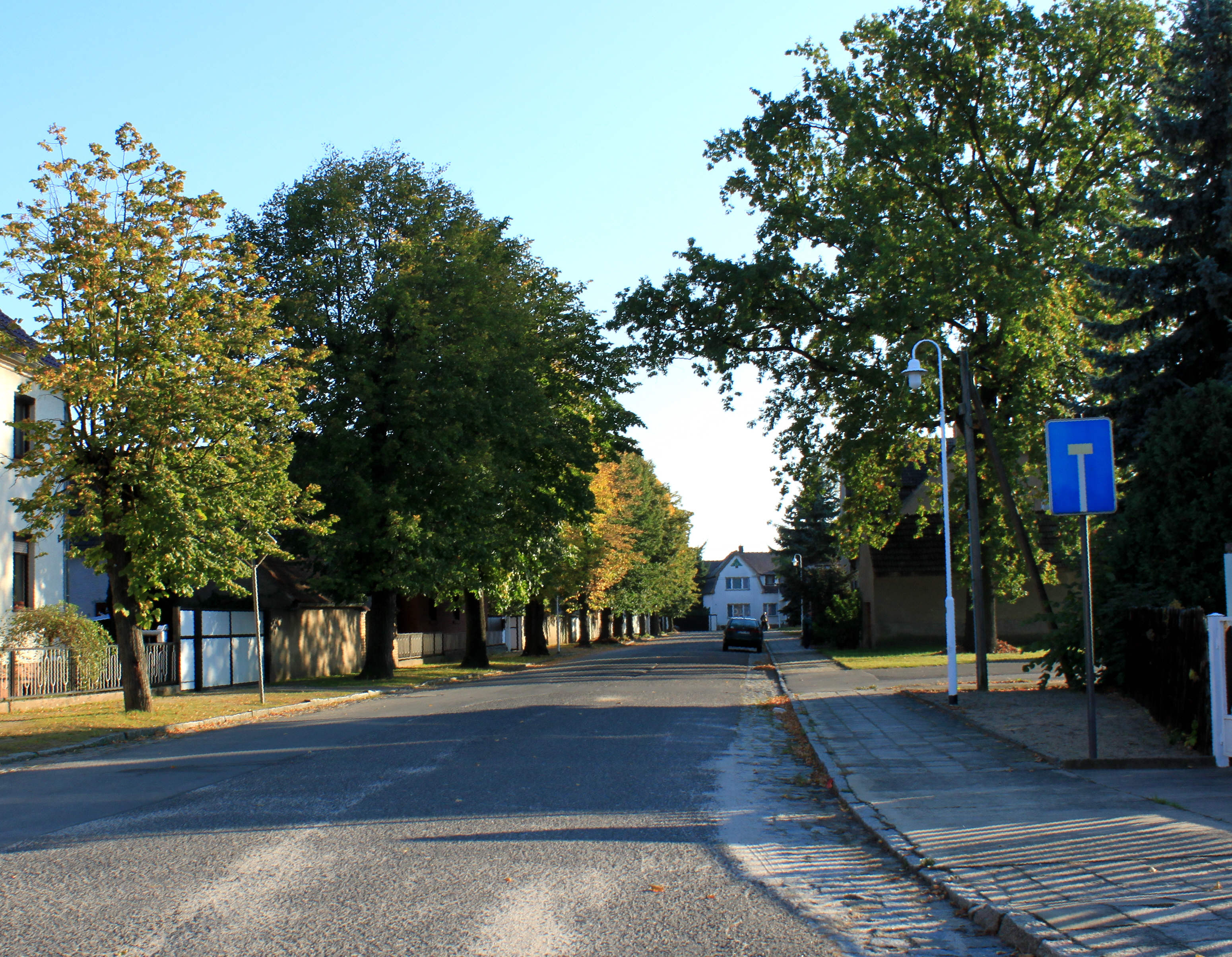 Haida